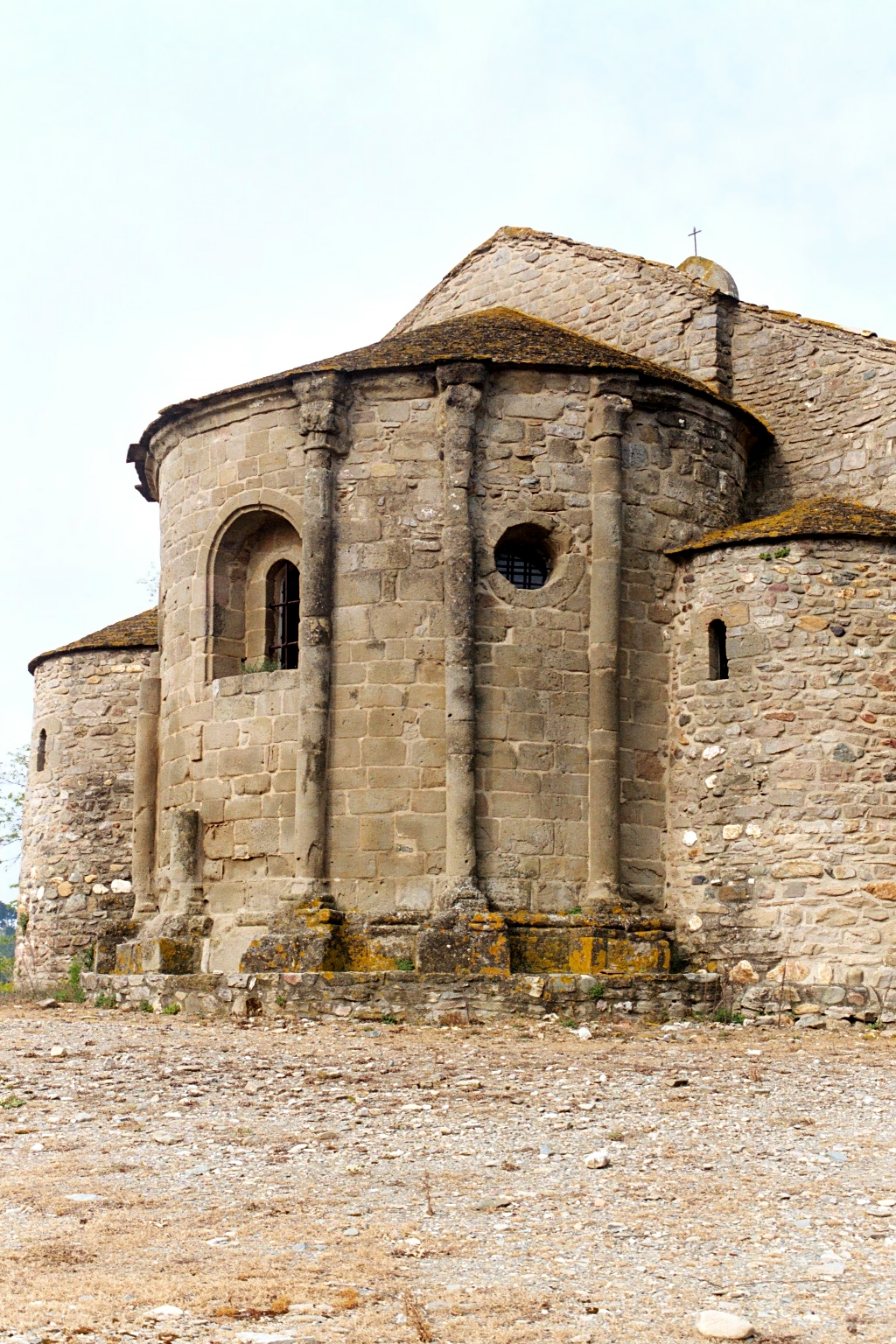 France - Languedoc - Aude - Azille - Chapelle Saint-Étienne de Vaissière